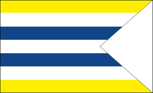 Vlajka města Púchova